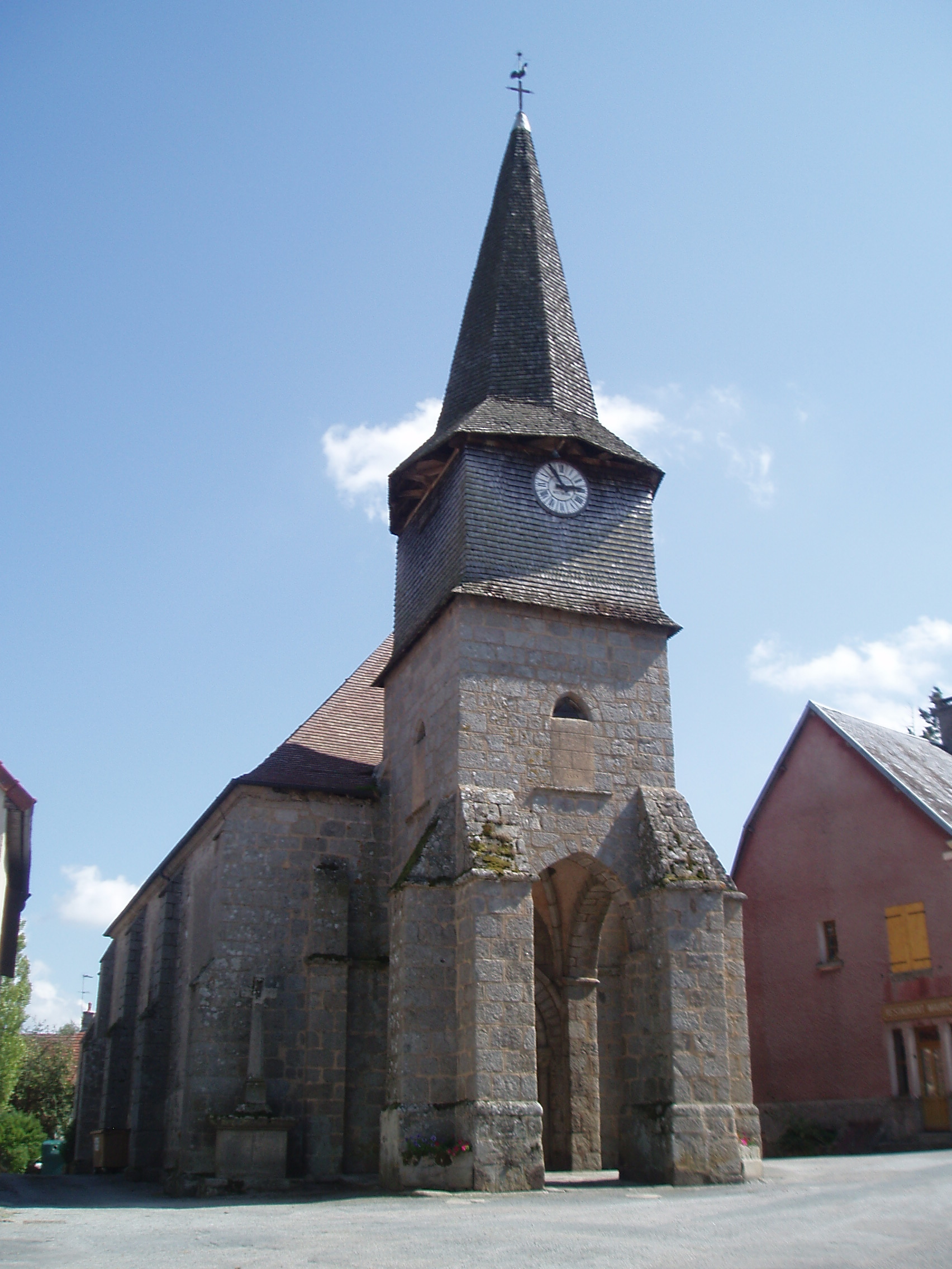 église de Creuse